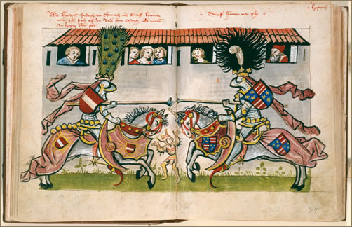 Ulrich von Richenthal, Chronik des Konzils von Konstanz, um 1470 Manuscript in the Badische Landesbibliothek, Karlsruhe, Germany Cod. St. Georgen 63, fol. 53v / 54r